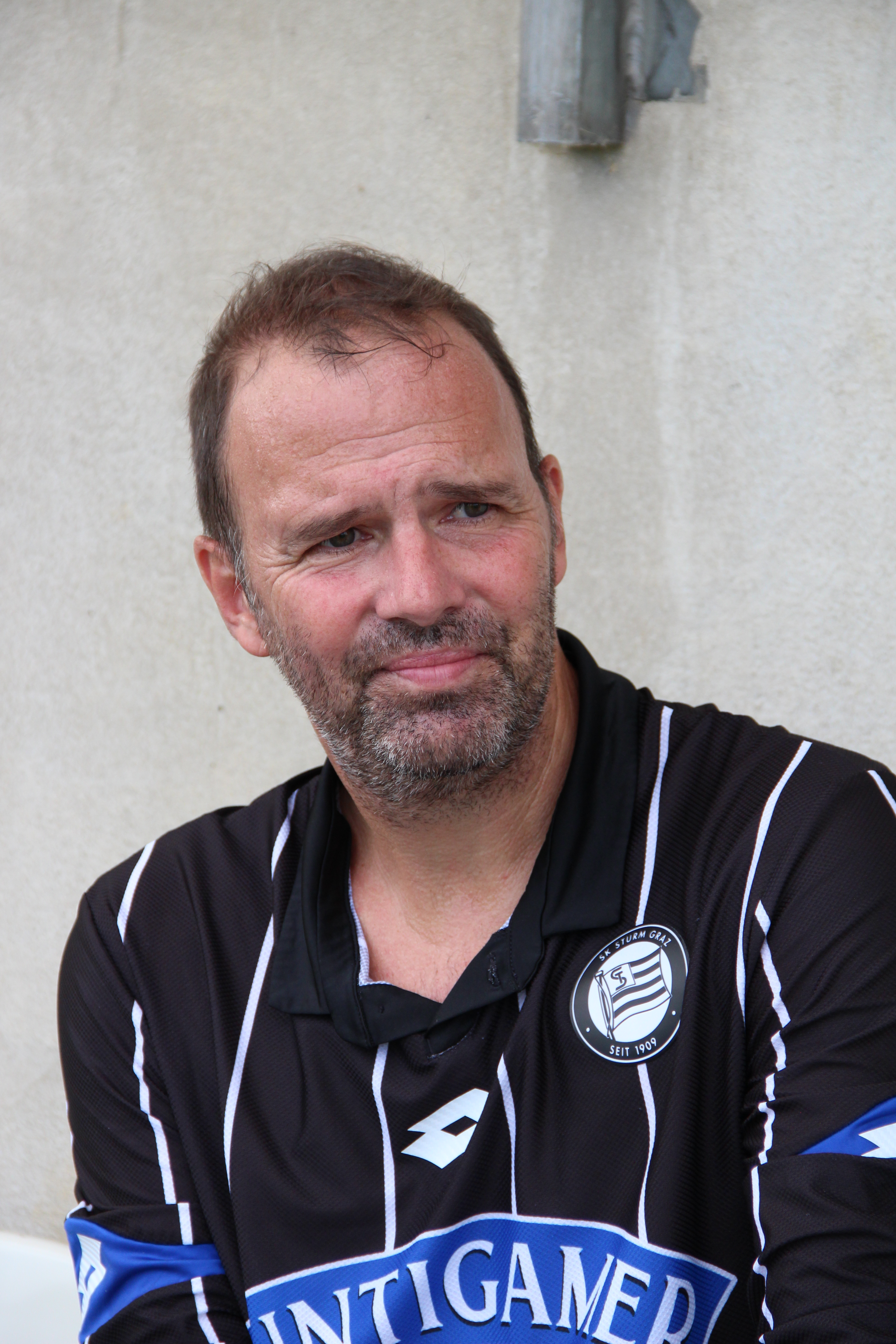 Zeltweger Legendenturnier 2018